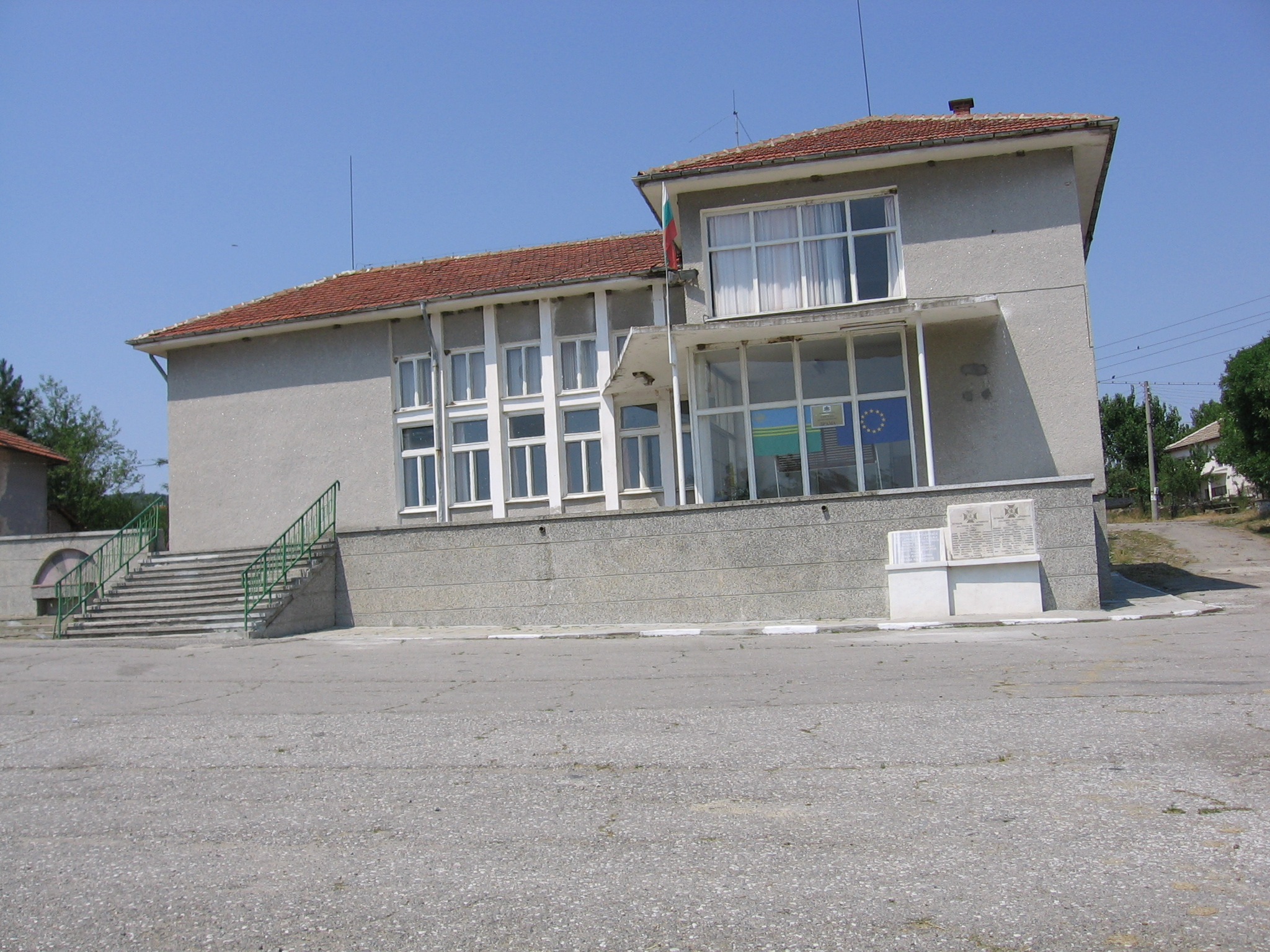 Сградата на някогашното читалище, днес кметство на село Драма, България